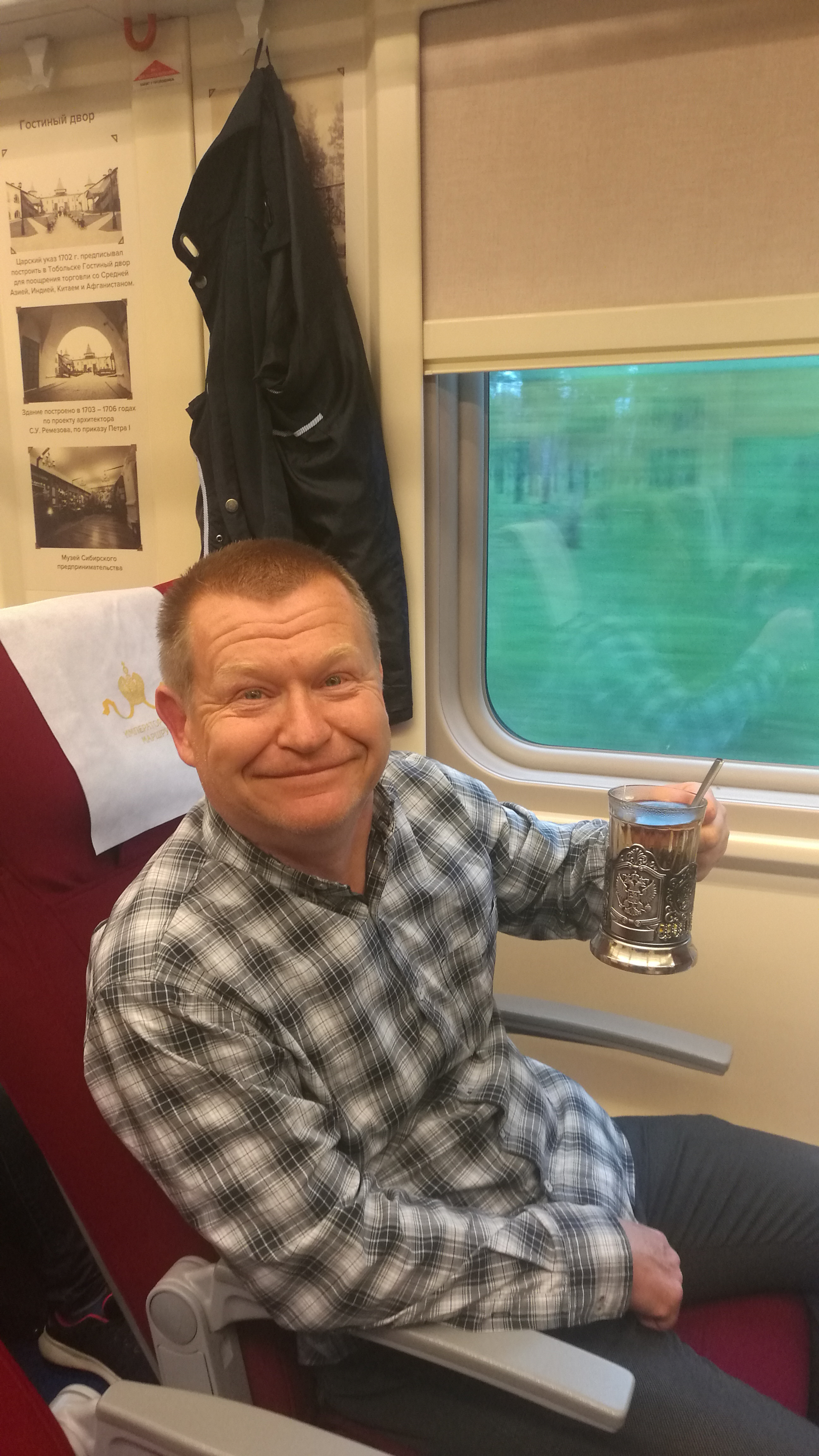 Pola esperantisto Mirek Dziedzic en la elektrotrajno Tobolsko - Tjumeno